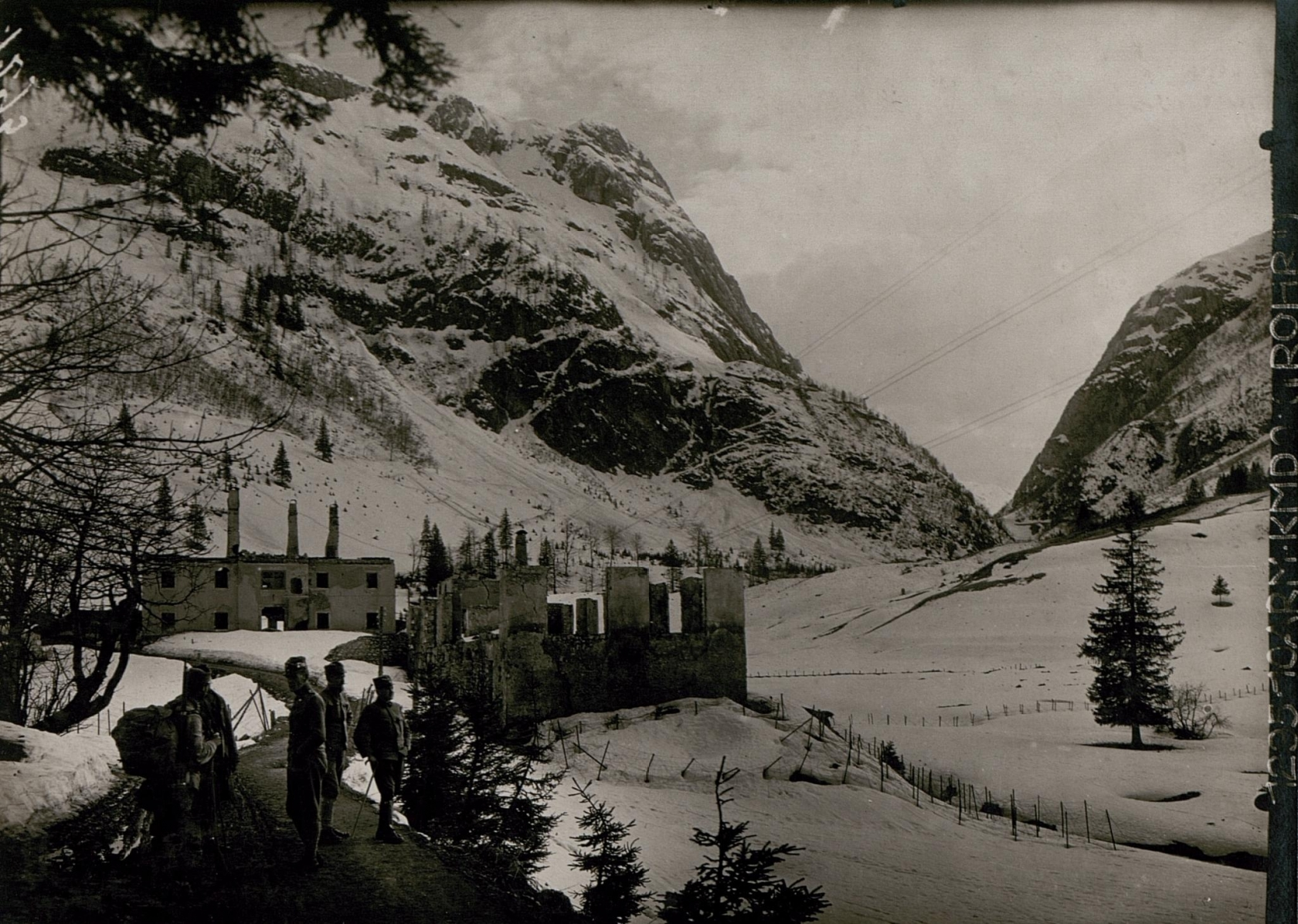 Zerstörtes Plöckenhaus mit Plöckensperre, Standpunkt an der Strasse der Plöckensperre.